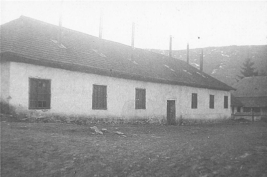 Кузня в Лисичеві - 1920